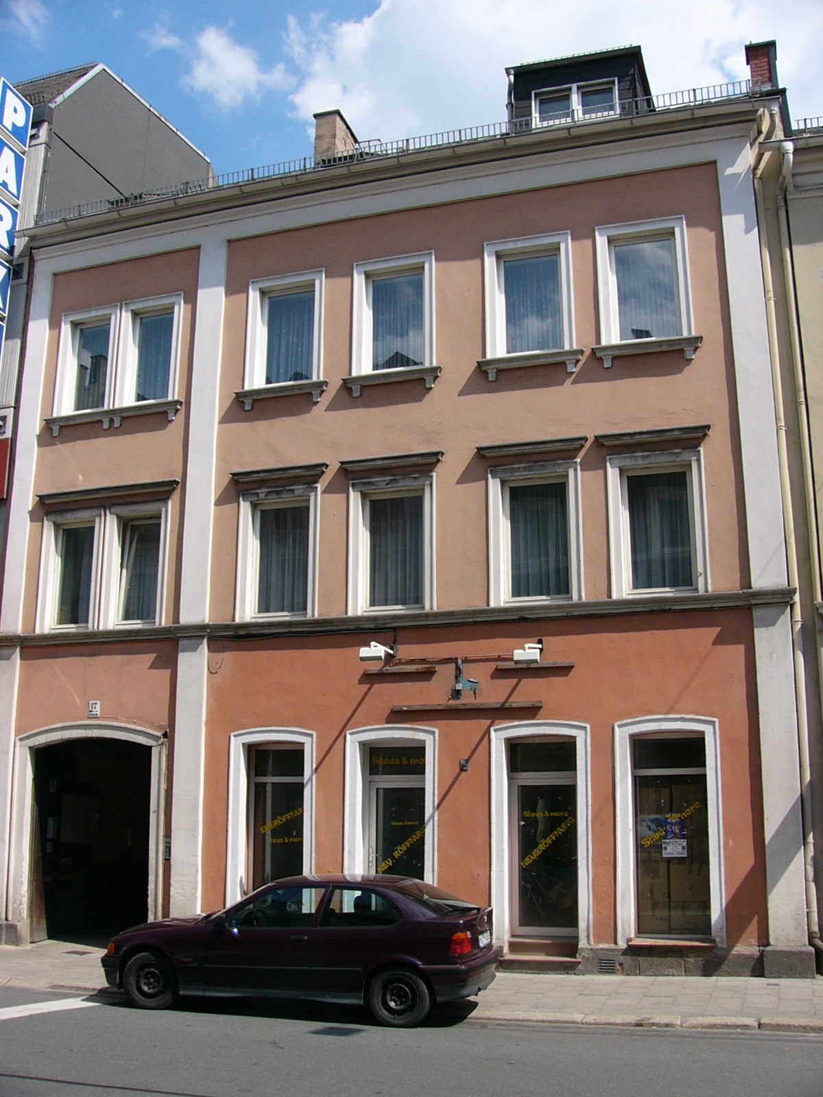 Standort des Wohnhauses des Malers Georg Könitzer, Marienstraße 17, Hof